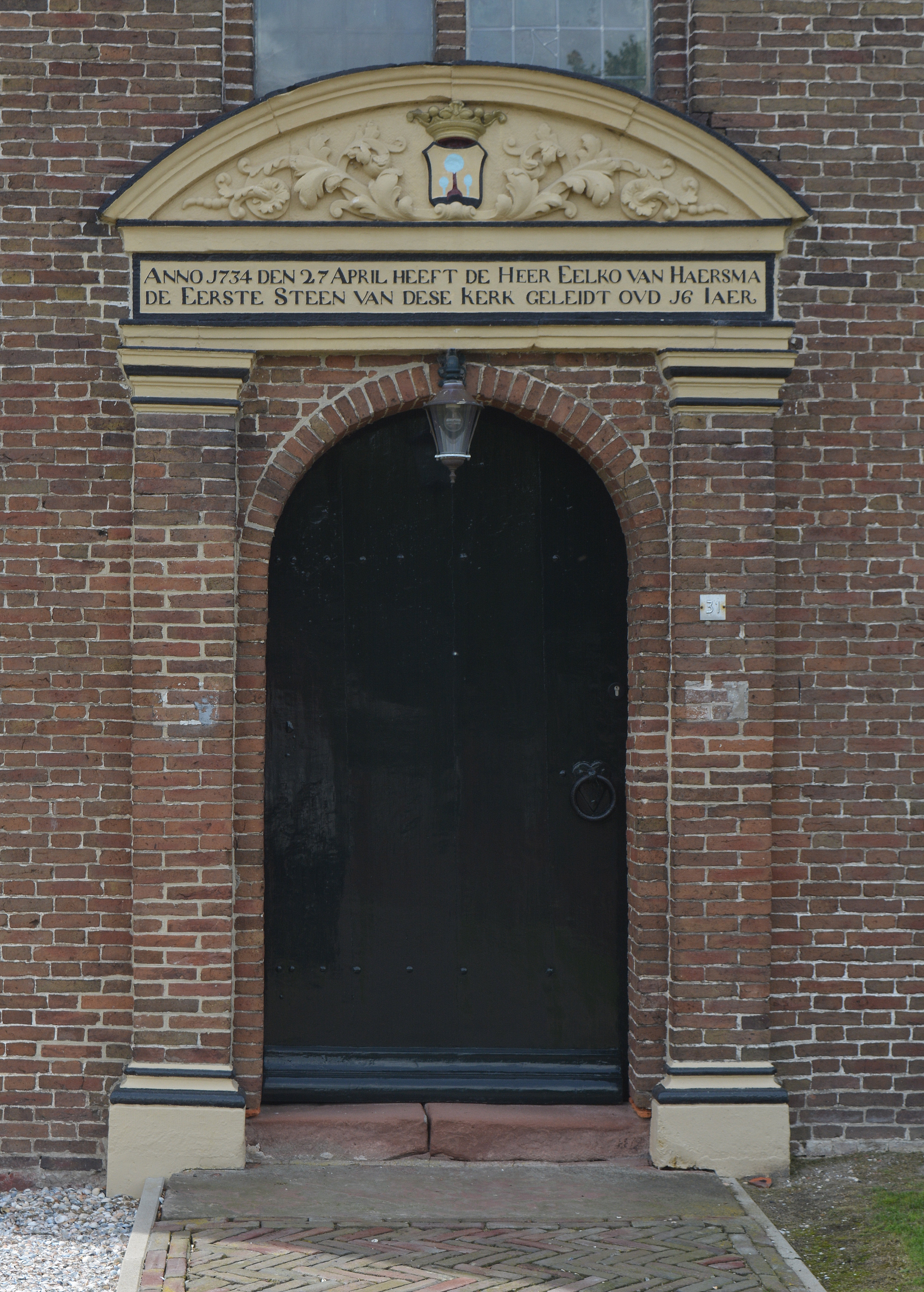 Surhuizum, prot. dorpskerk, oostelijk portaal